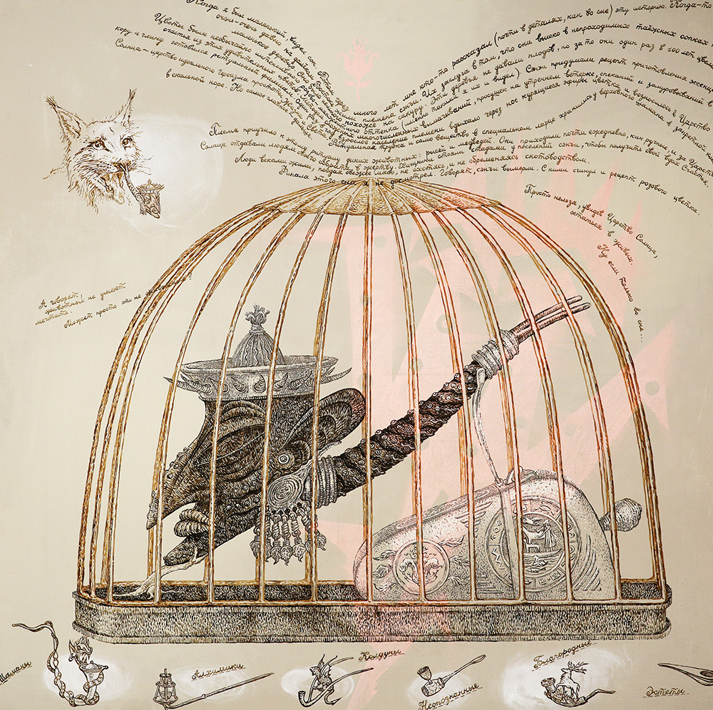 СЭНЪИ. Холст, масло, 100Х100 см. 2010 г